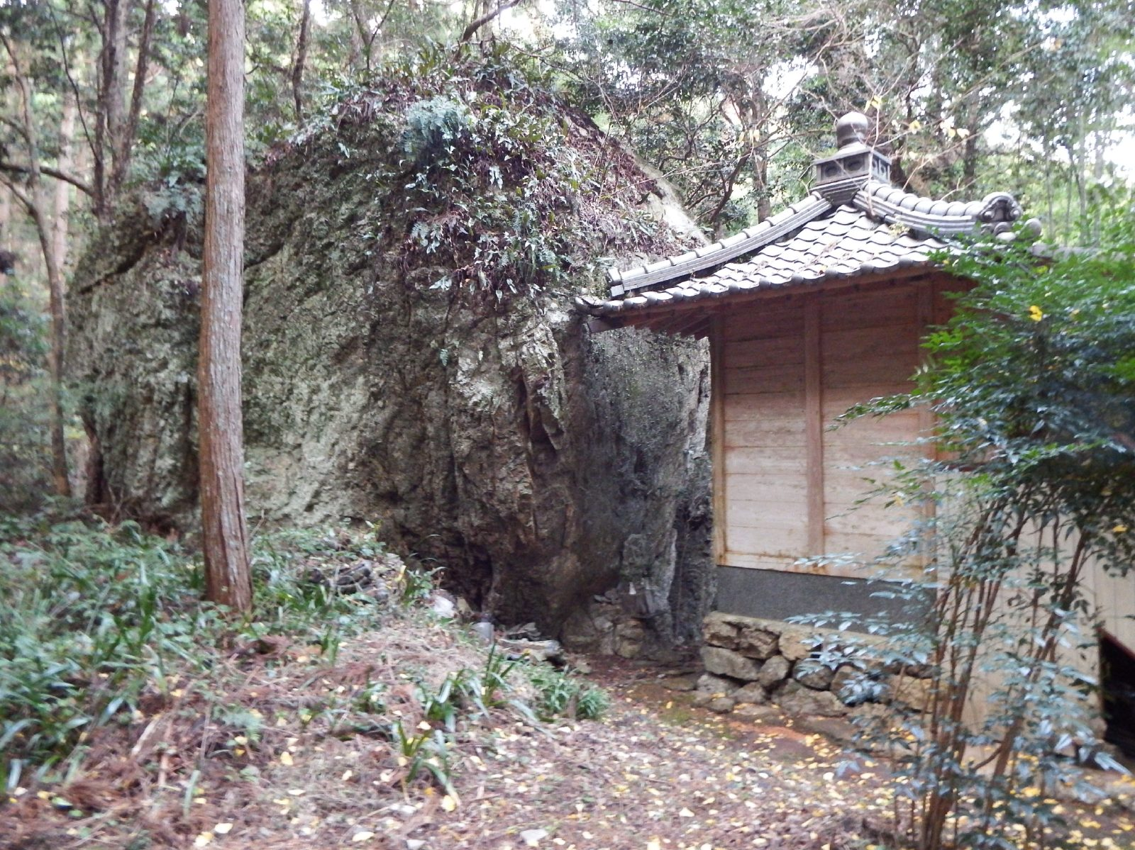 善楽寺の白岩不動